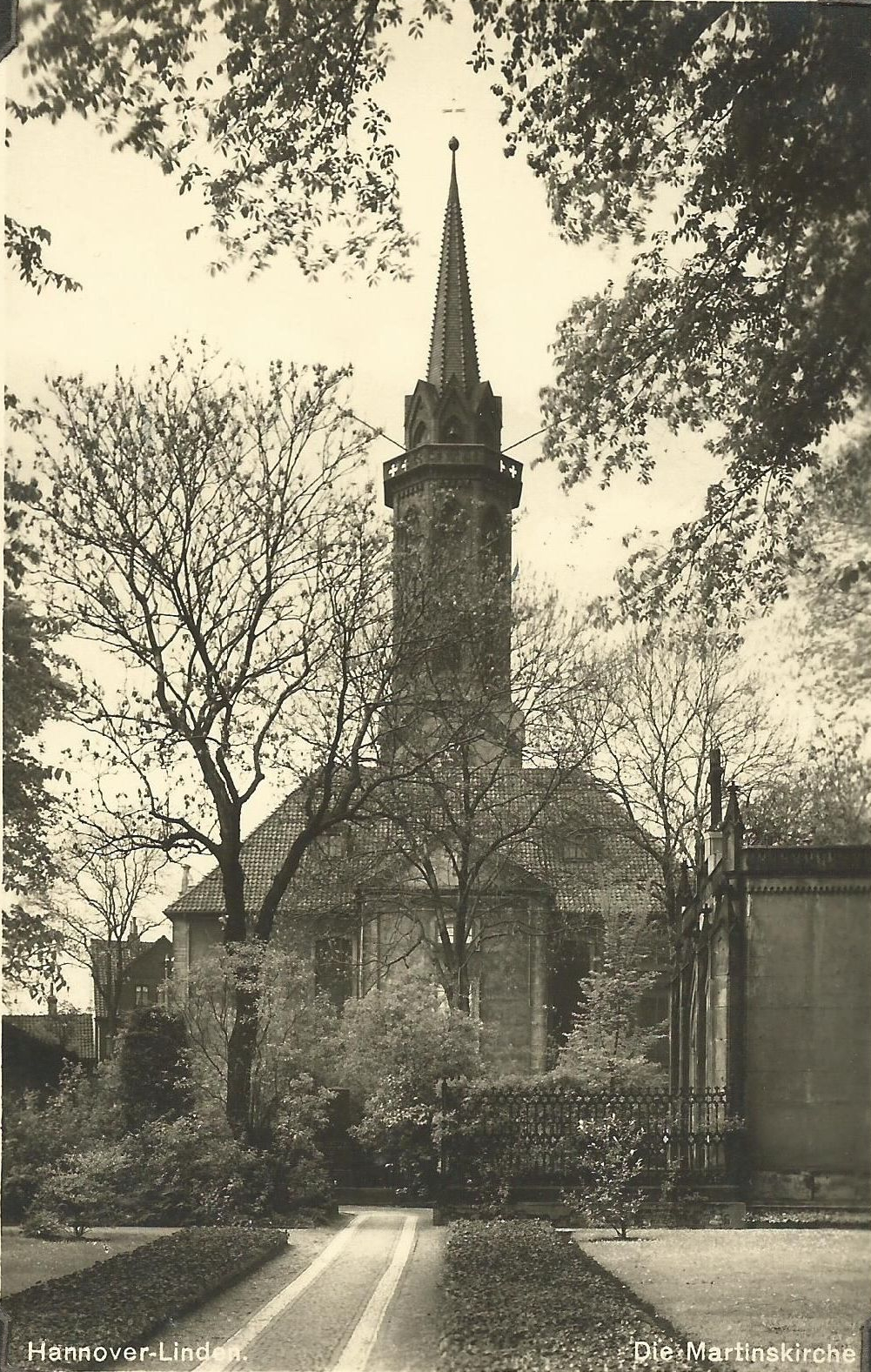 Die alte Martinskirche in Linden